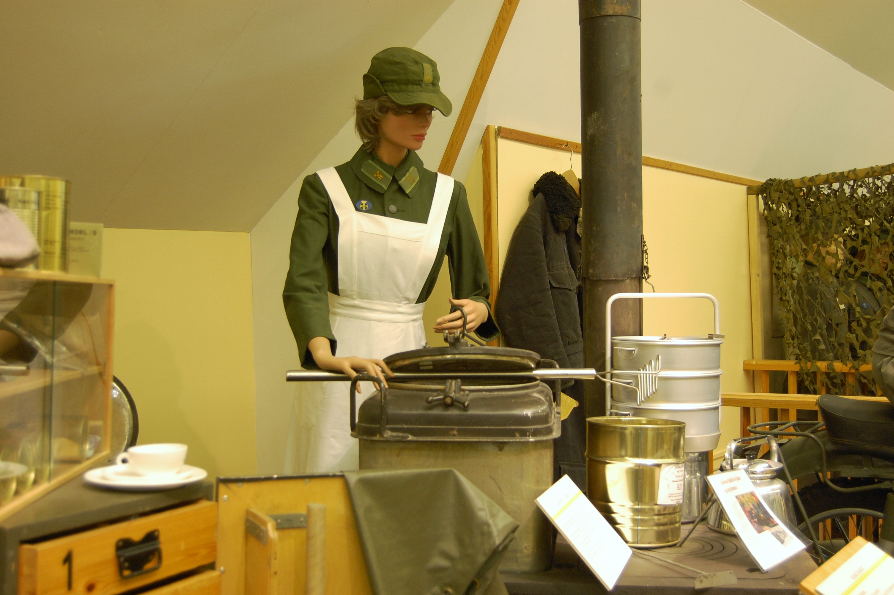 Svensk koklotta från tiden runt 70-talet på Hemvärnsmuseet.